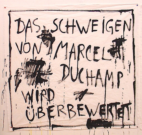 peinture